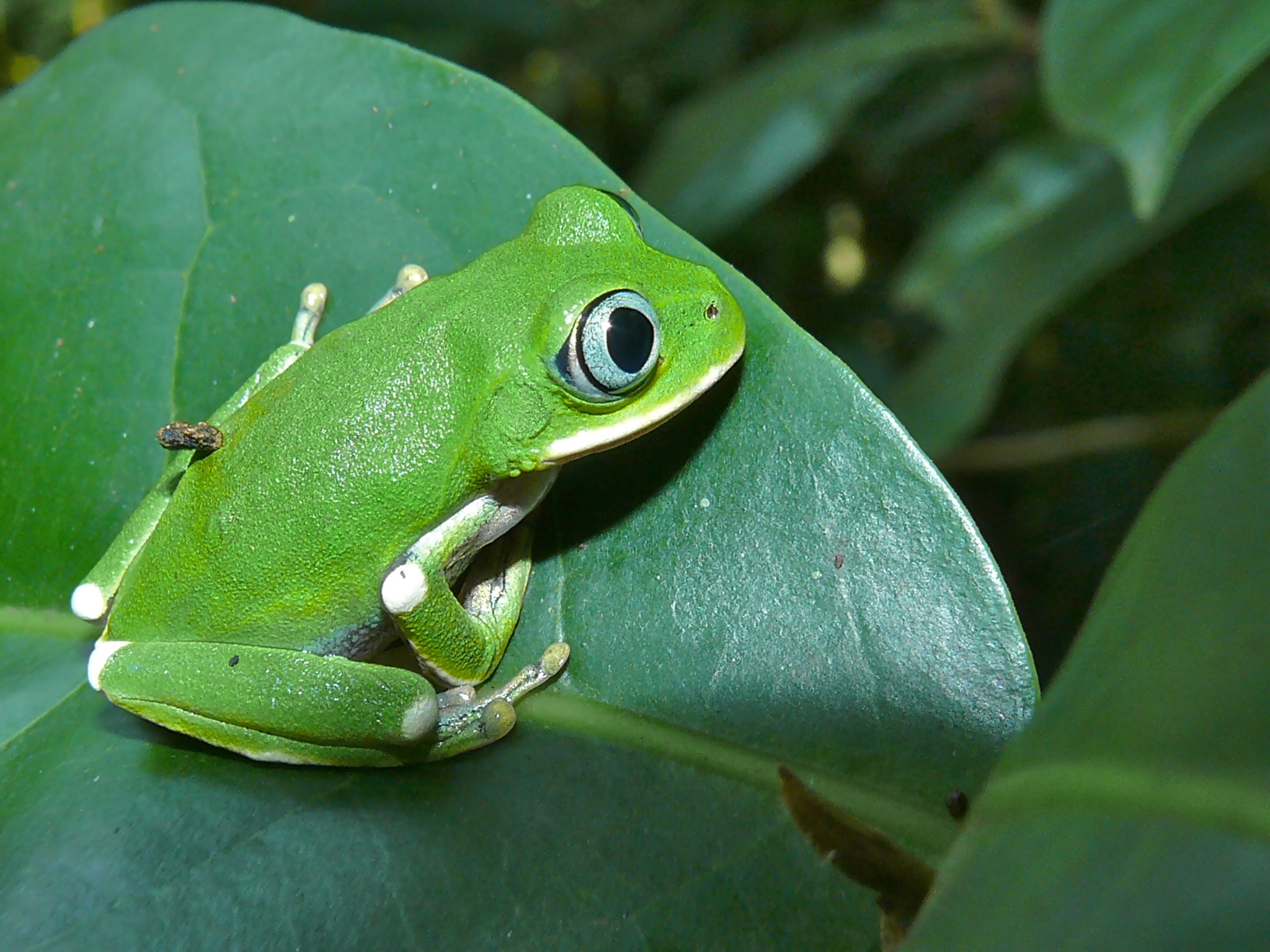 Kibale Forest NP, UGANDA